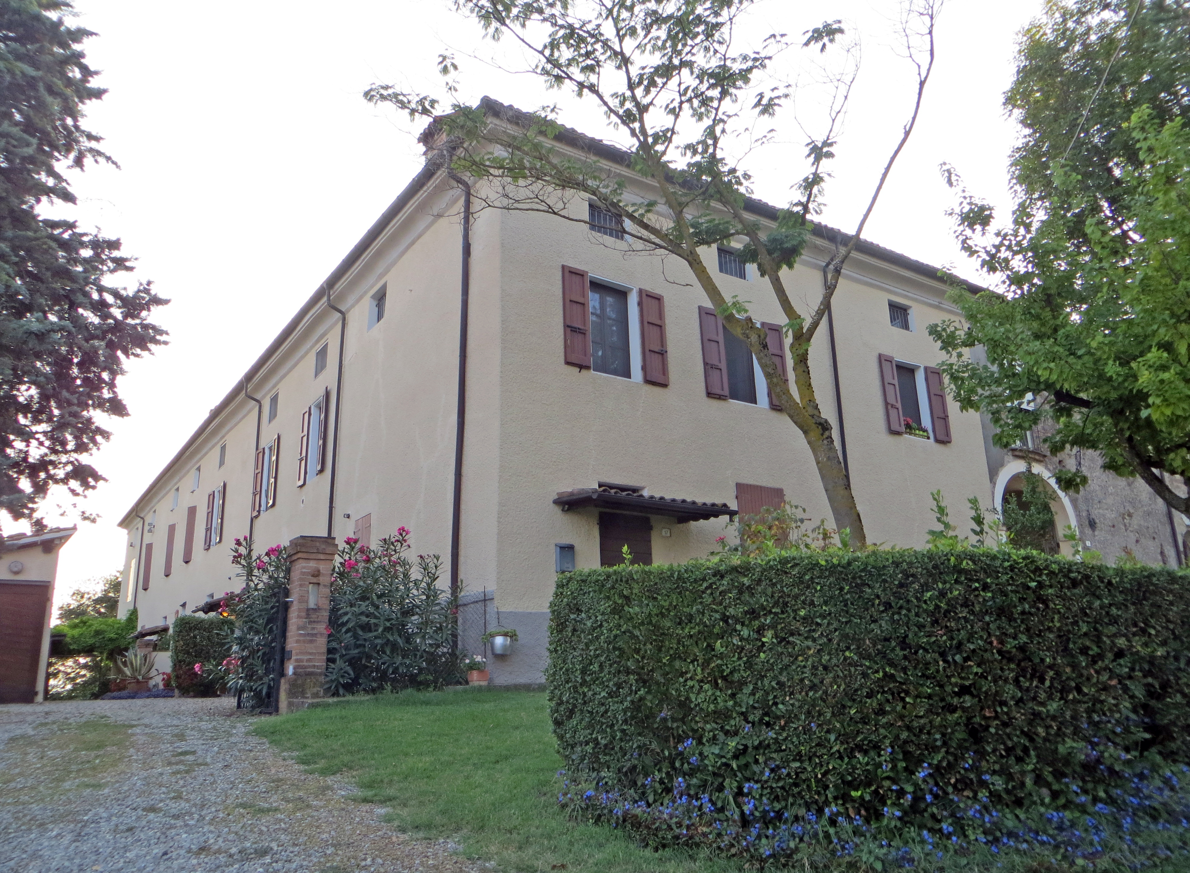 Facciata est del castello di Segalara This is a photo of a monument which is part of cultural heritage of Italy.